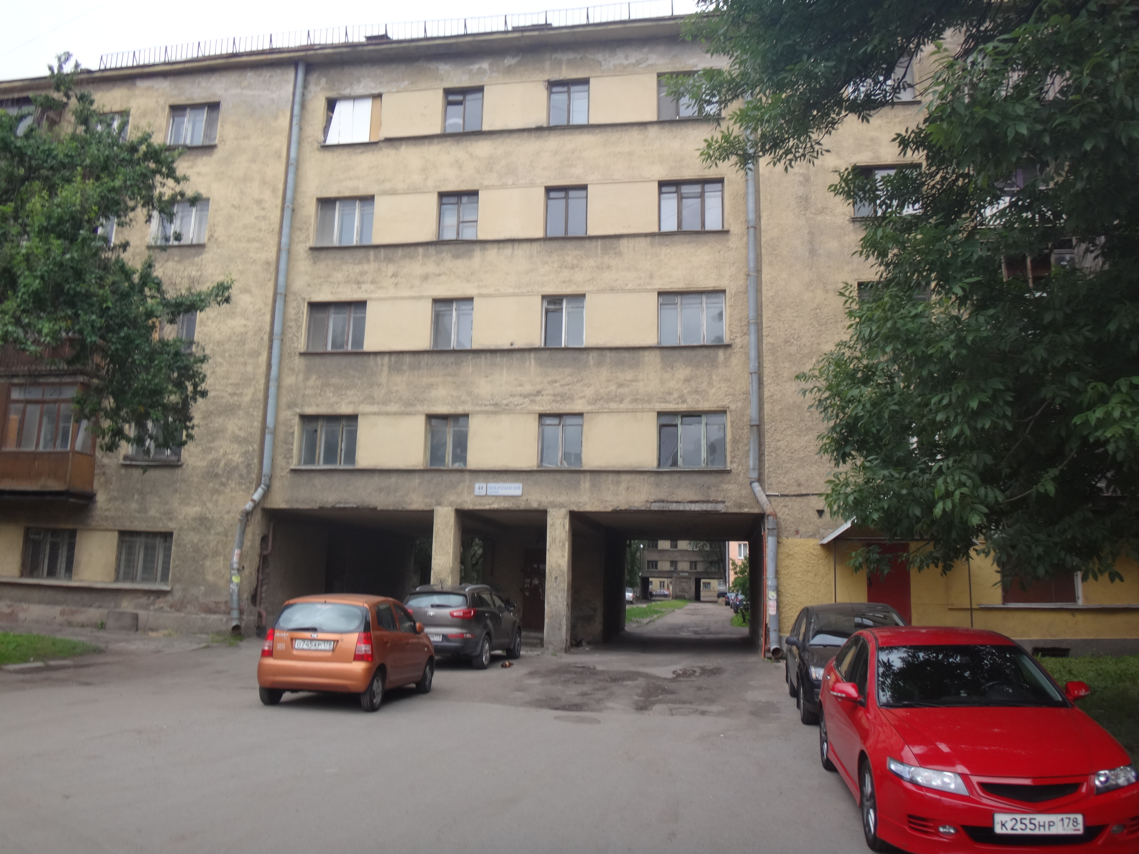 Двор сороковых корпусов (Кондратьевский, 40)